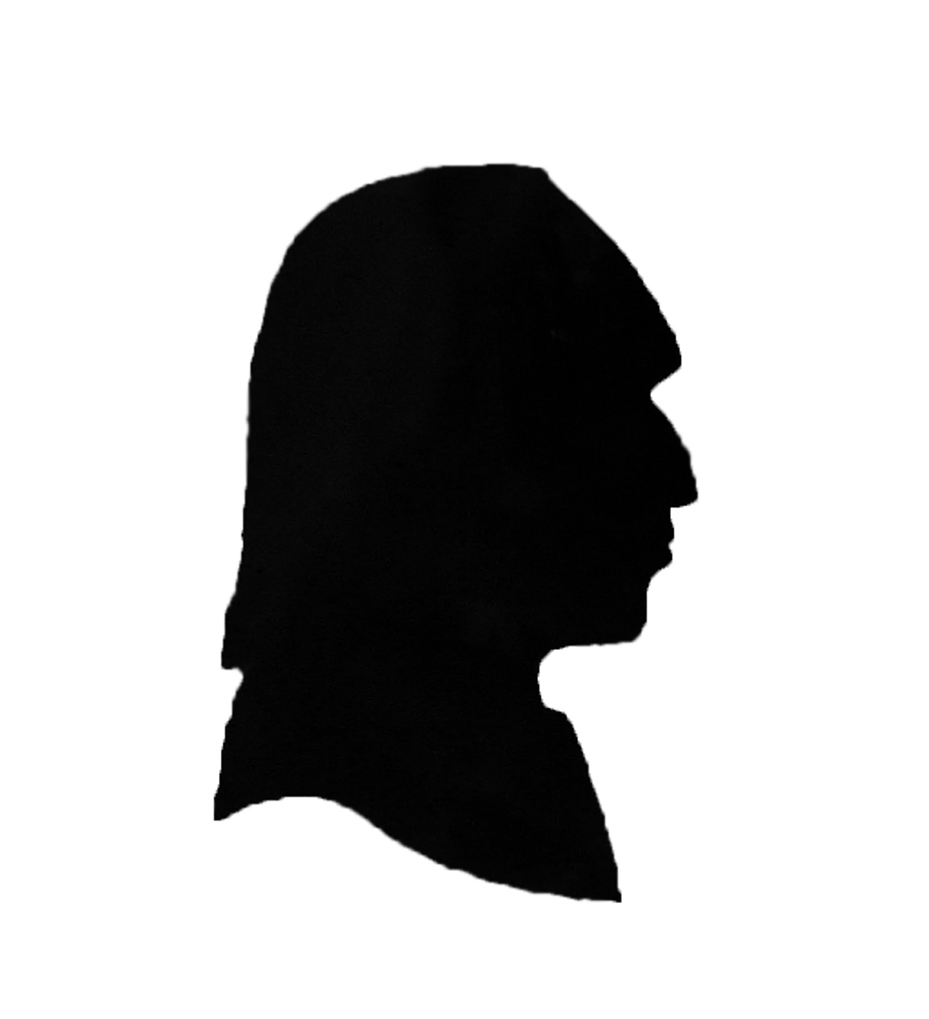 Le dernier supplicié de la Perheux. Cette silhouette a été réalisée par J.-F. Oberlin en 1786. Elle porte la légende suivante : "Franz Fehlrad, qui a abattu en 1785 le "Did" de Neuviller. Dessiné alors qu'il était sur la roue. Il s'appelait en réalité Médardus, de la vallée de Munster. A tué David Krieger de Bellefosse avec le même bois de cerf". Musée Oberlin à Waldersbach.